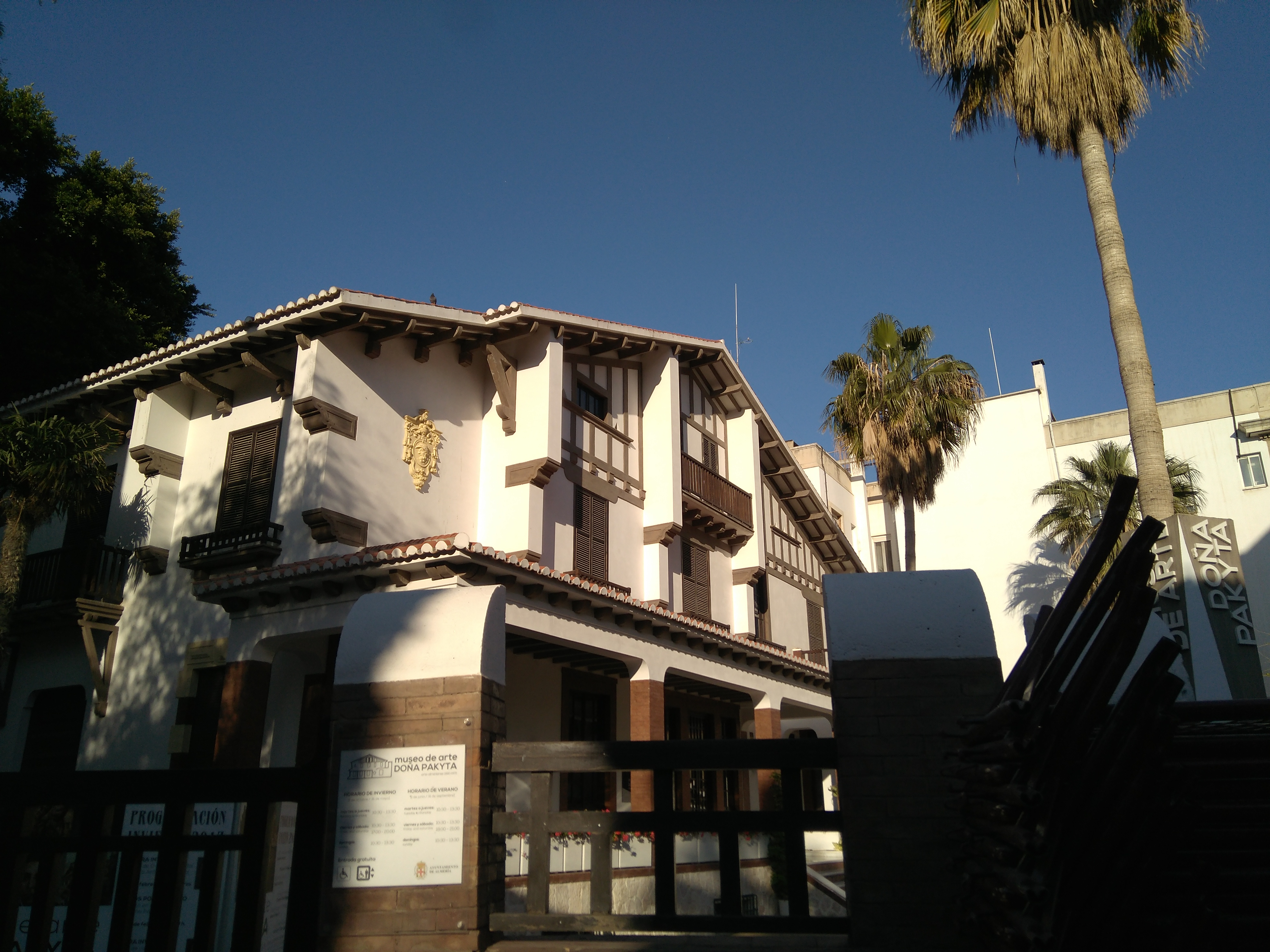 La casa Montoya es un edificio histórico del primer tercio del siglo XX situado en Almería (provincia de Almería, Comunidad Autónoma de Andalucía). Más conocido como el "Museo de Doña Pakyta".